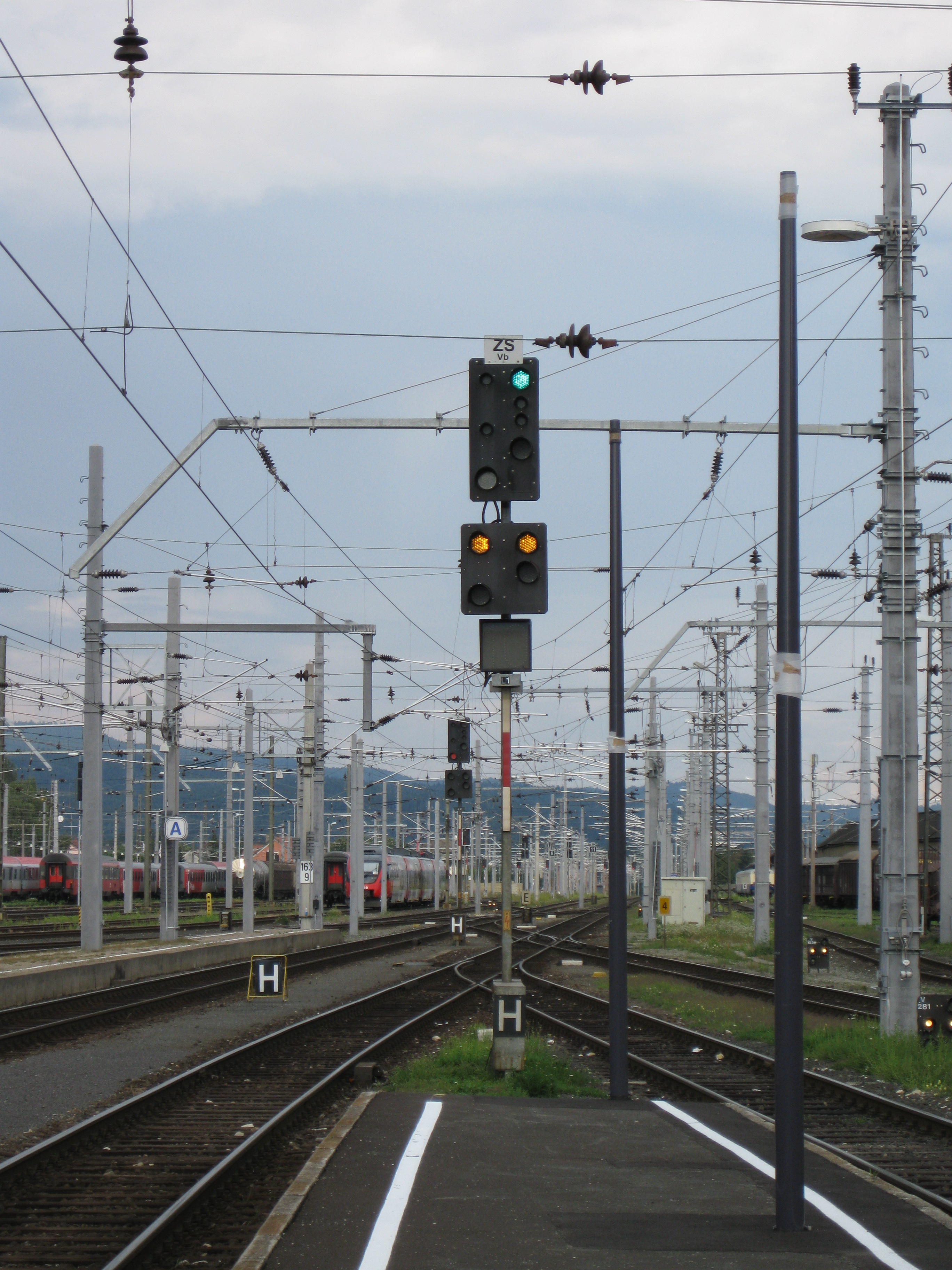 Hauptsignal der ÖBB zeigt den Begriff "Frei", das Vorsignal darunter zeigt den Begriff "Vorsicht"